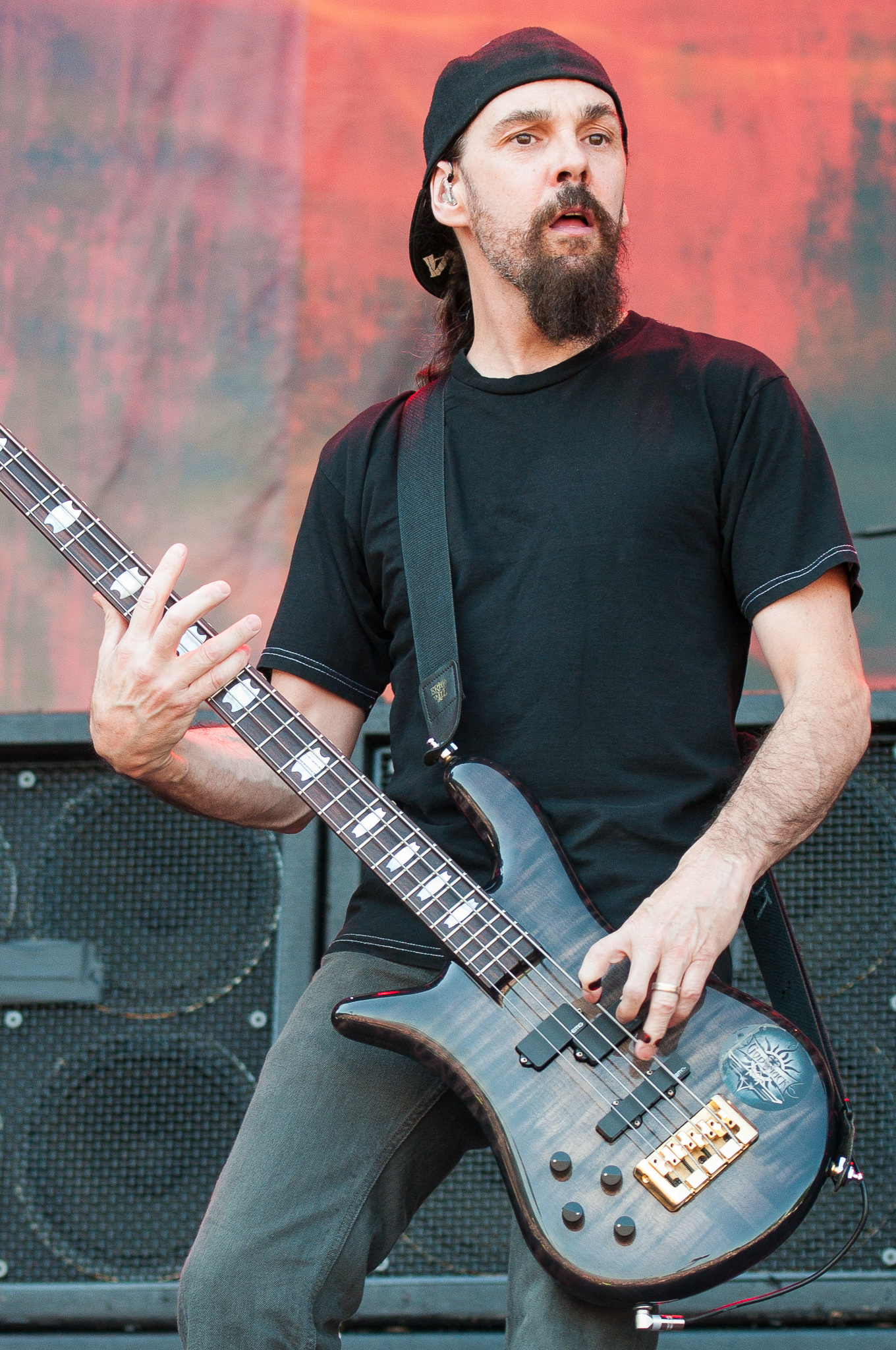 ARGO-Konzerte,Beck's Park Stage,Festival,Godsmack,Konzert,Livekonzert,Livemusik,Musik,RiP,Robbie Merrill,Rock im Park 2015